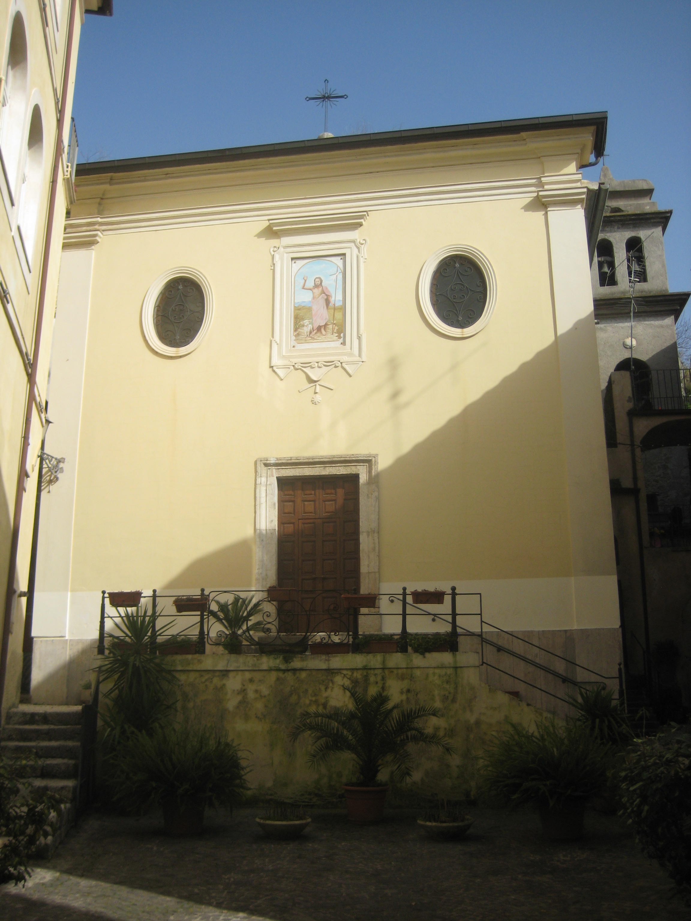 Chiesa e piazzetta di san Giovanni nel centro storico di Sora.